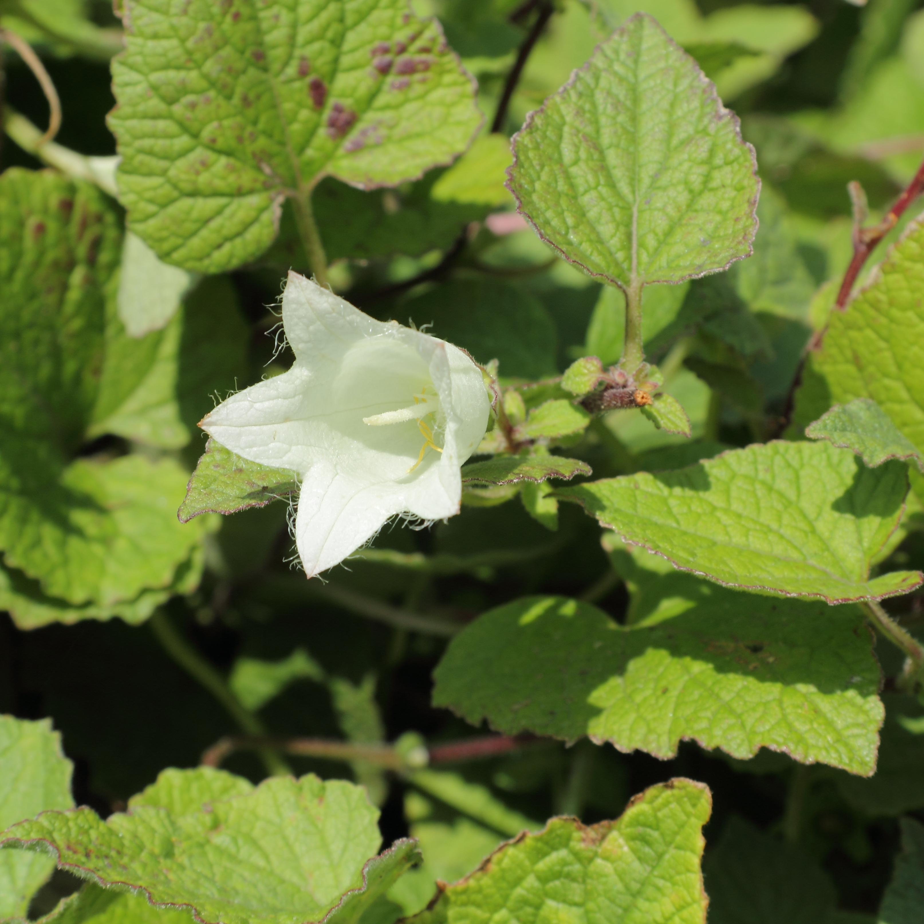 Campanula alliariifolia, identifierad med hjälp av befintlig skylt vid Kew Gardens, London.